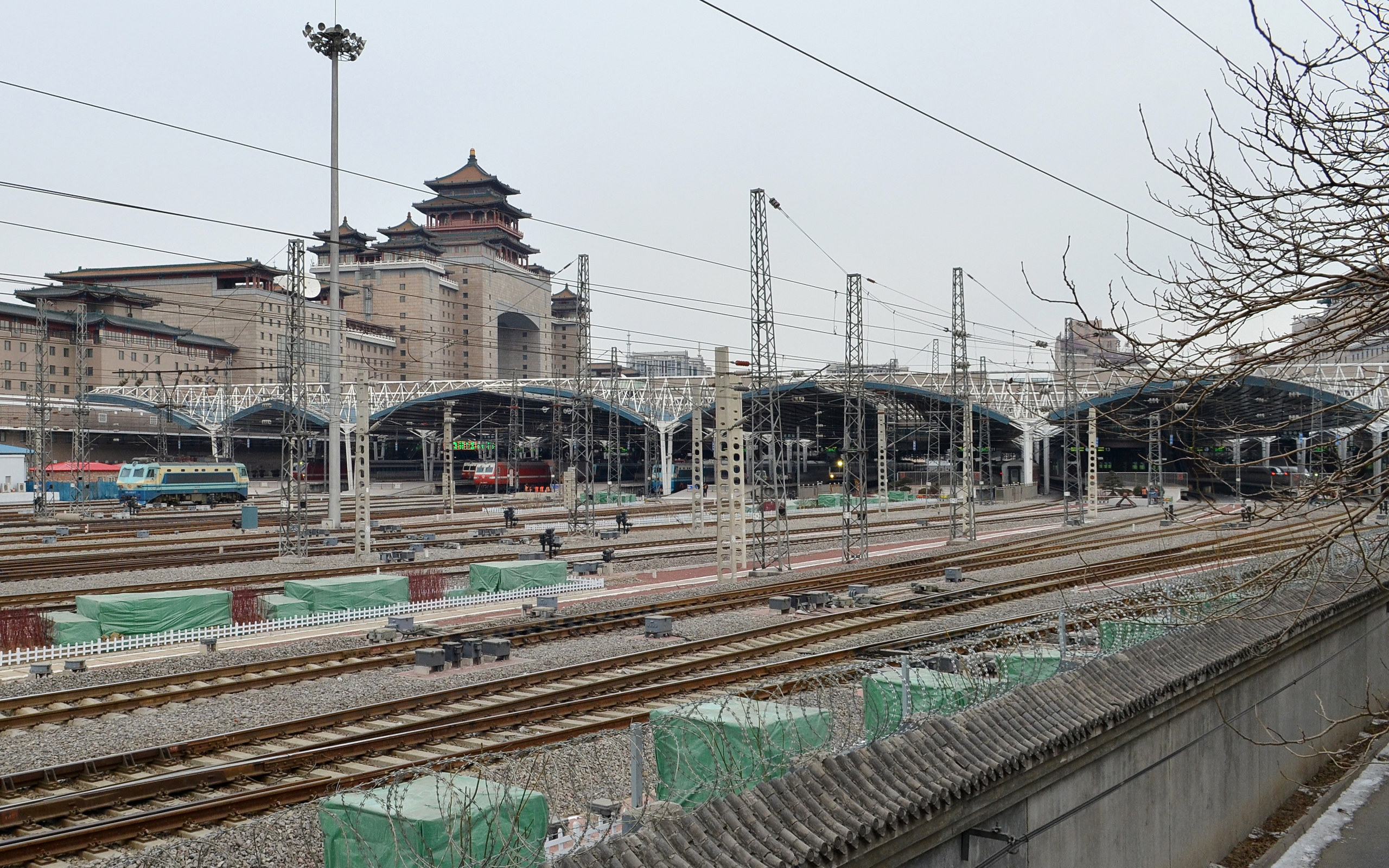 中文（中国大陆）: 北京西客站，拍摄于莲花池公园